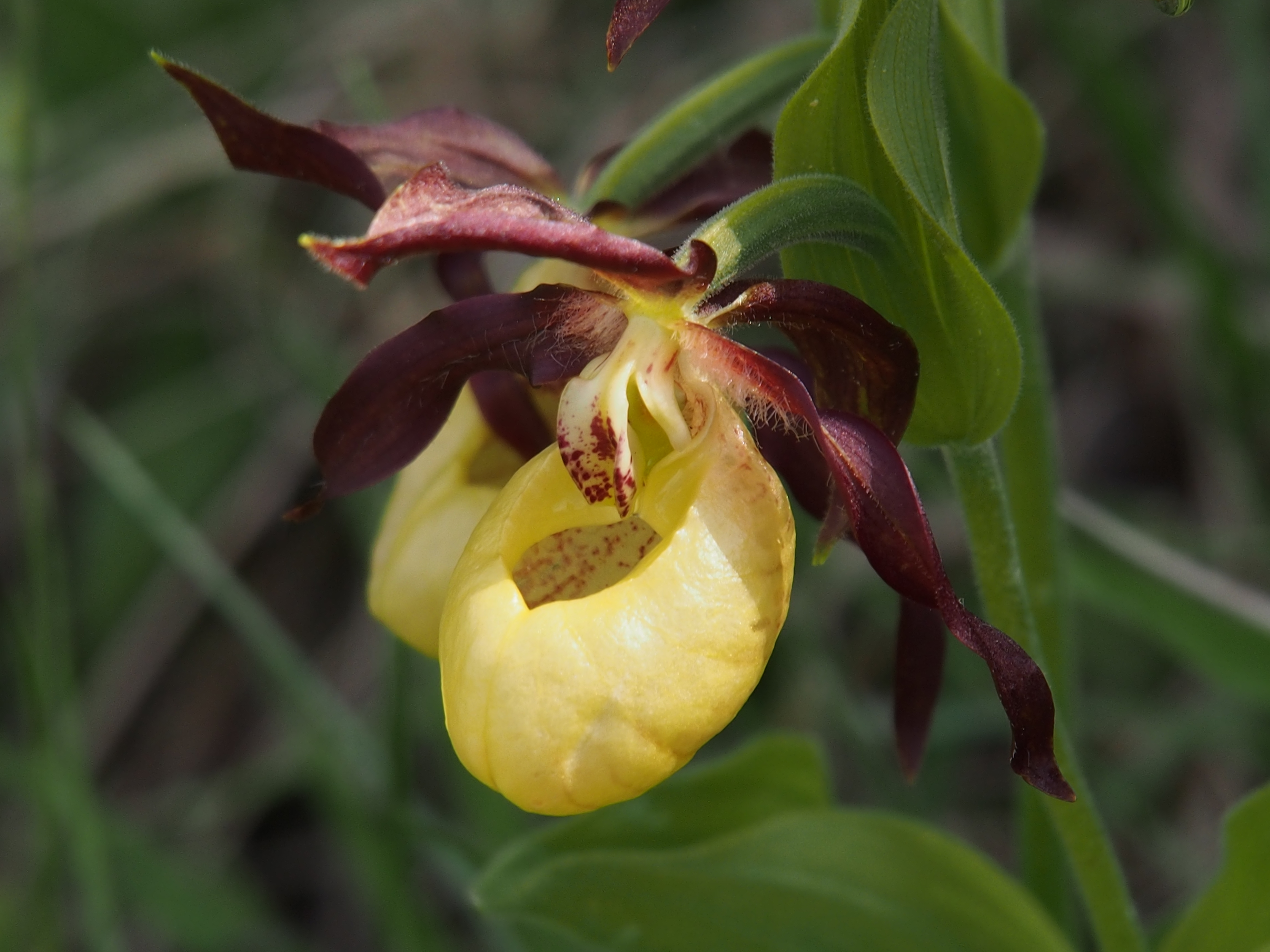 Seltener wilder Frauenschuh (Cypripedium calceolus) in Blüte an einem kalkhaltigen Standort im Naturpark Meißner-Kaufunger Wald